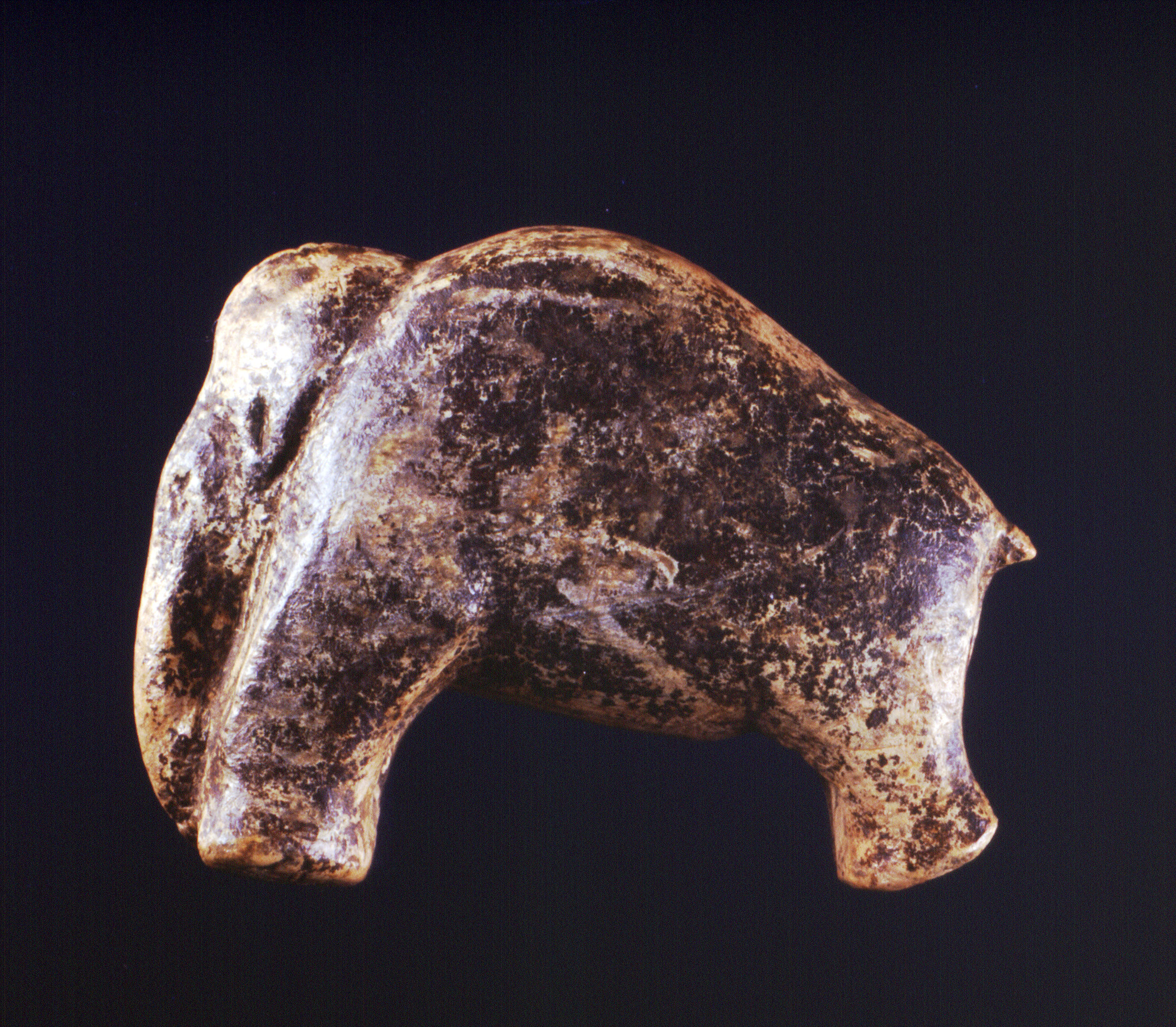 Mammutooooo